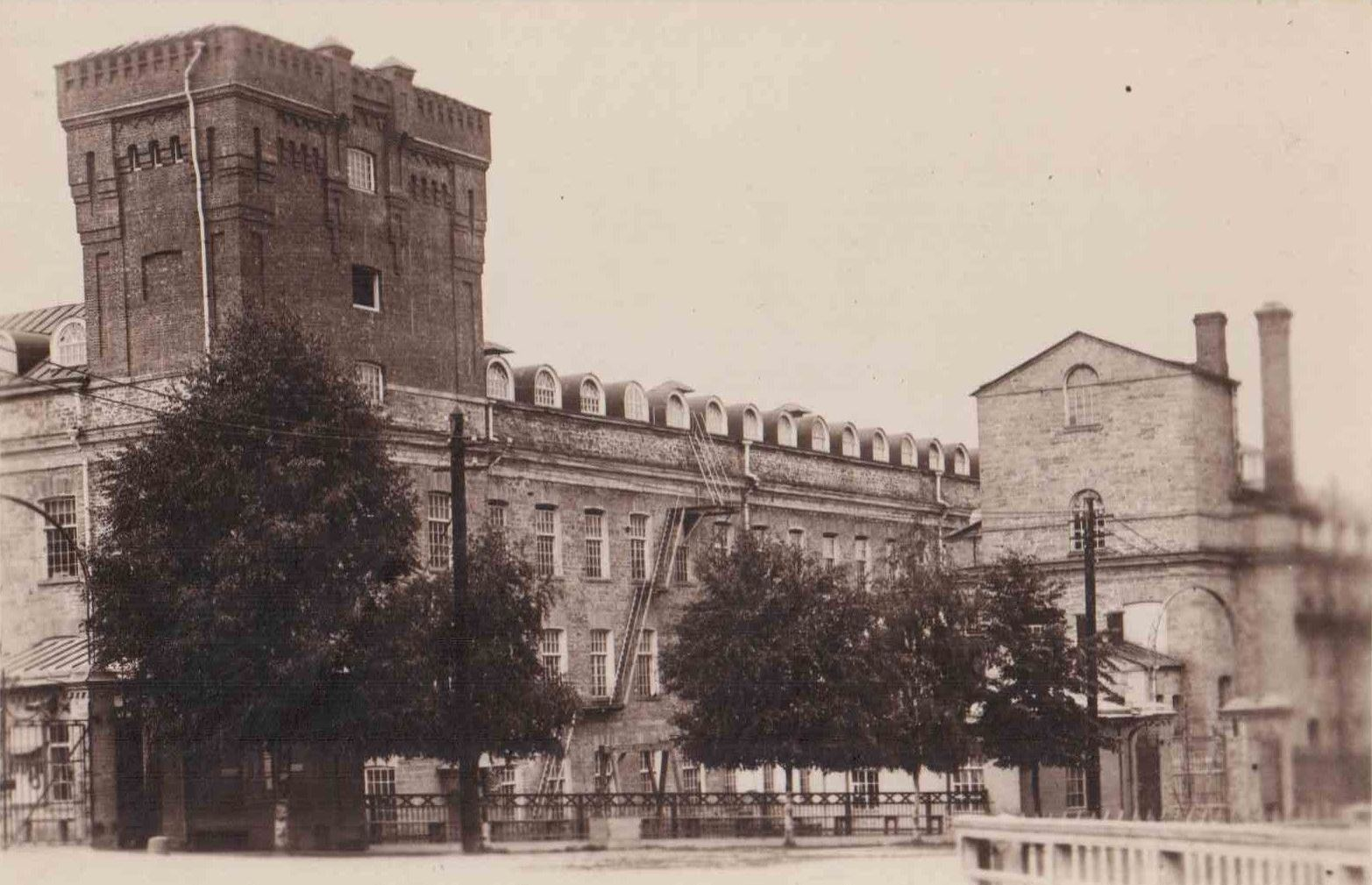 Narva linavabrik